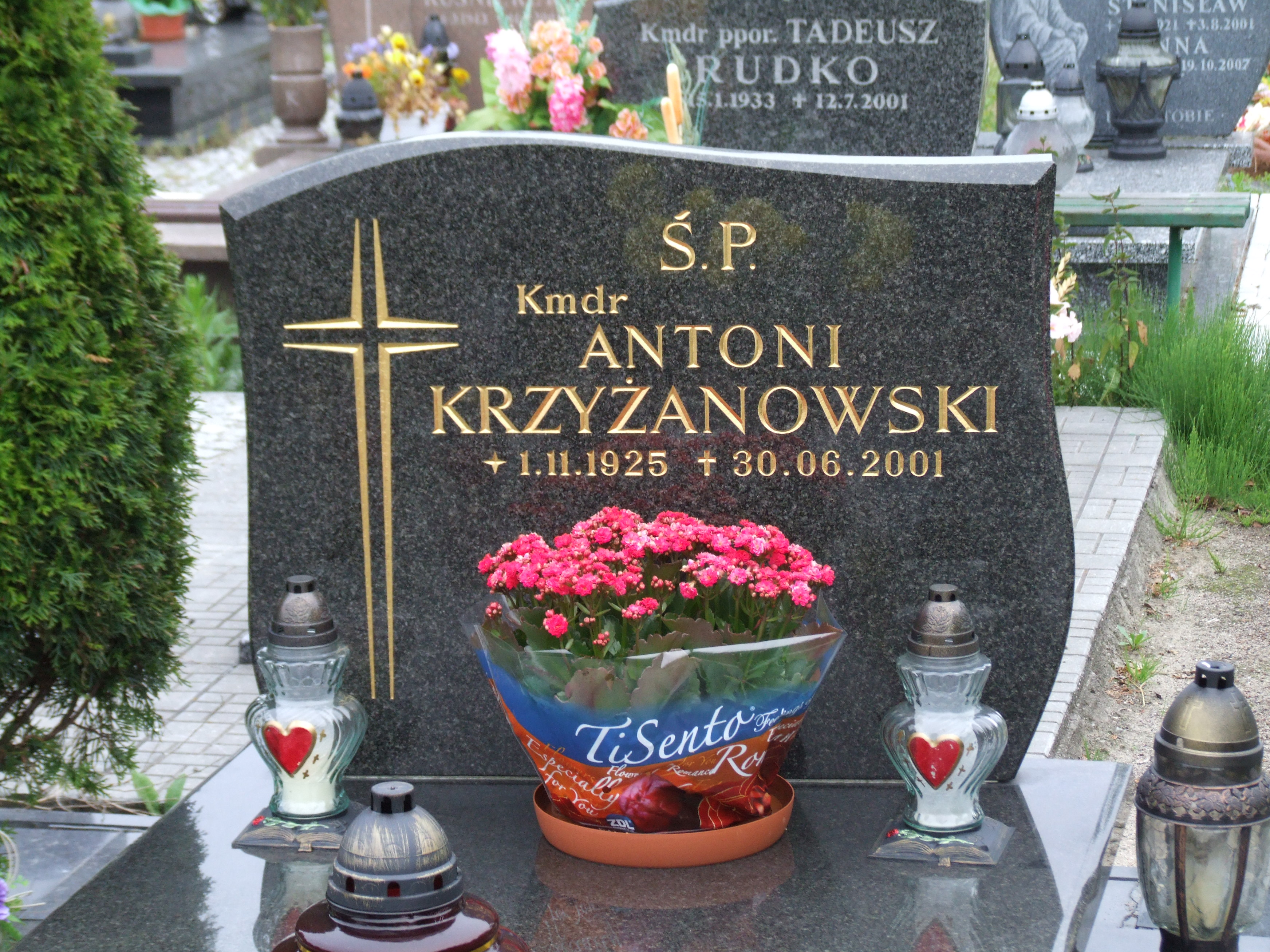 Gdynia-Oksywie Cmentarz Marynarki Wojennej